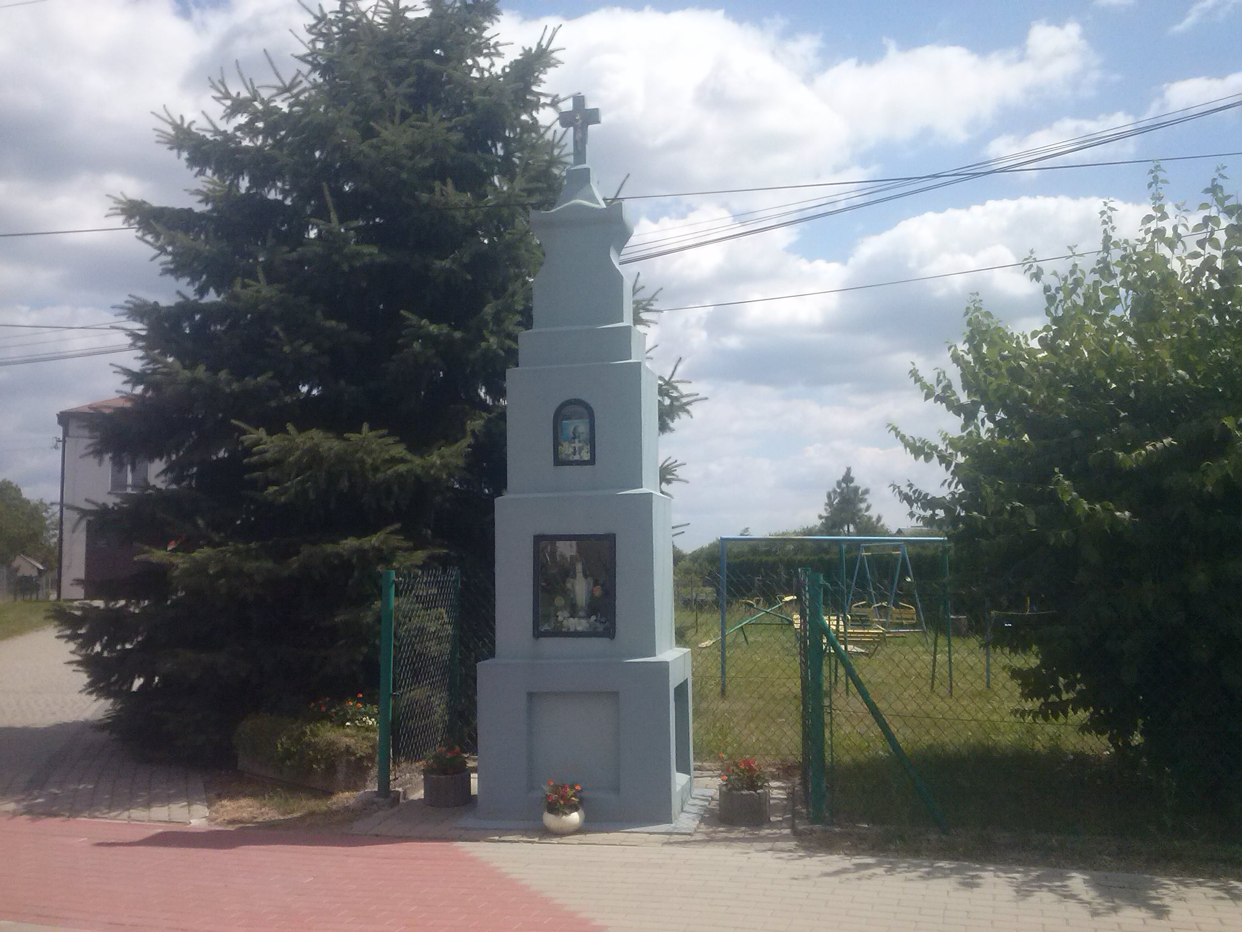 Pomnik Krzyża Świętego z figurą Matki Bożej i obrazem św. Jana Pawła II